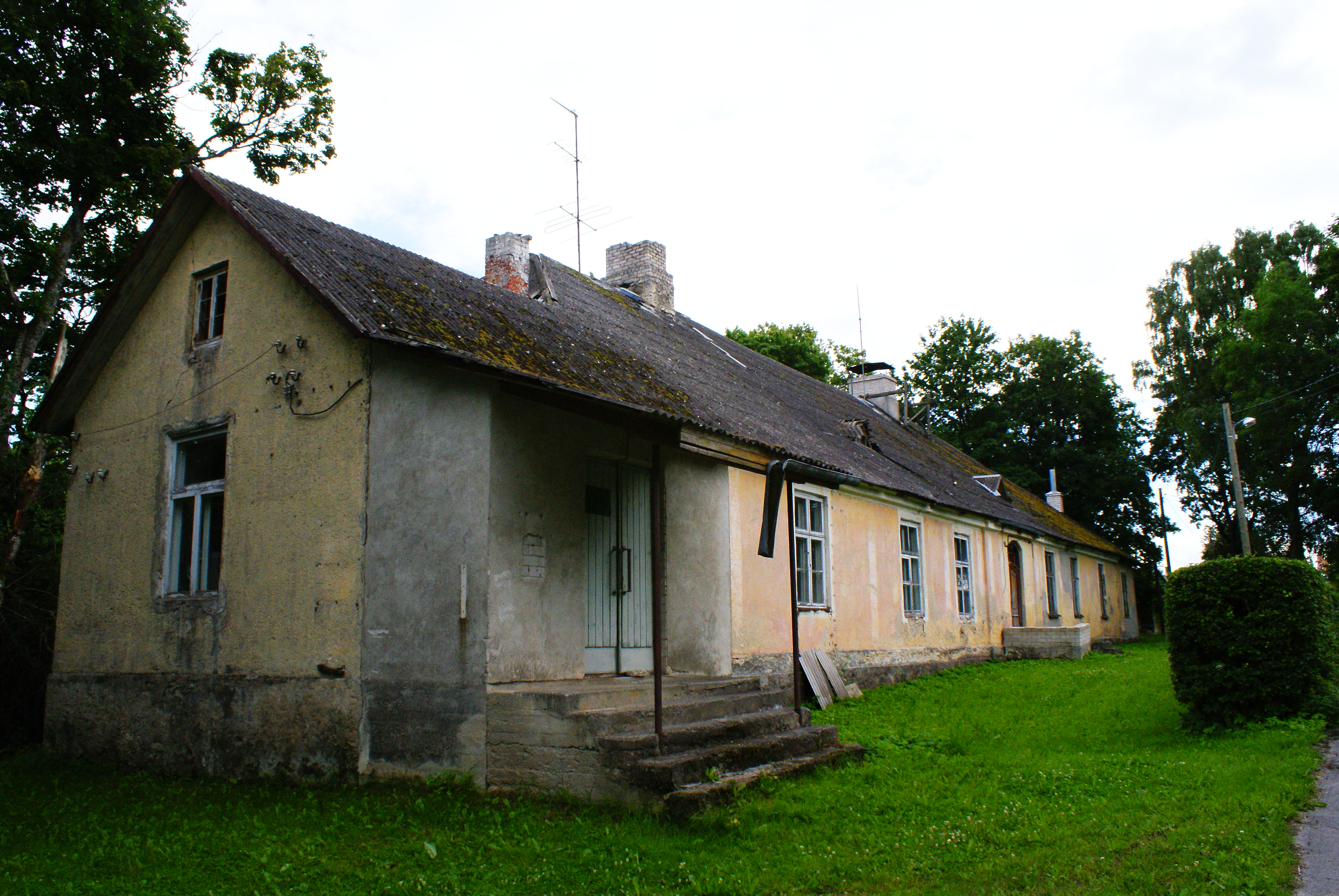 Juuru pastoraadi peahoone